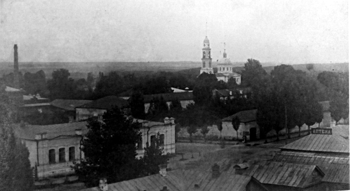 Казанский храм Дмитровска Орловской области